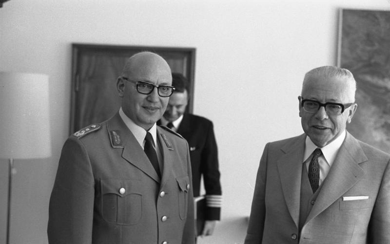 Bundespräsident Dr. Dr. Gustav Heinemann empfängt den neuen Stellvertreter des Generalinspekteurs der Bundeswehr, Generalleutnant Dr. Karl Schnell zum Antrittsbesuch.